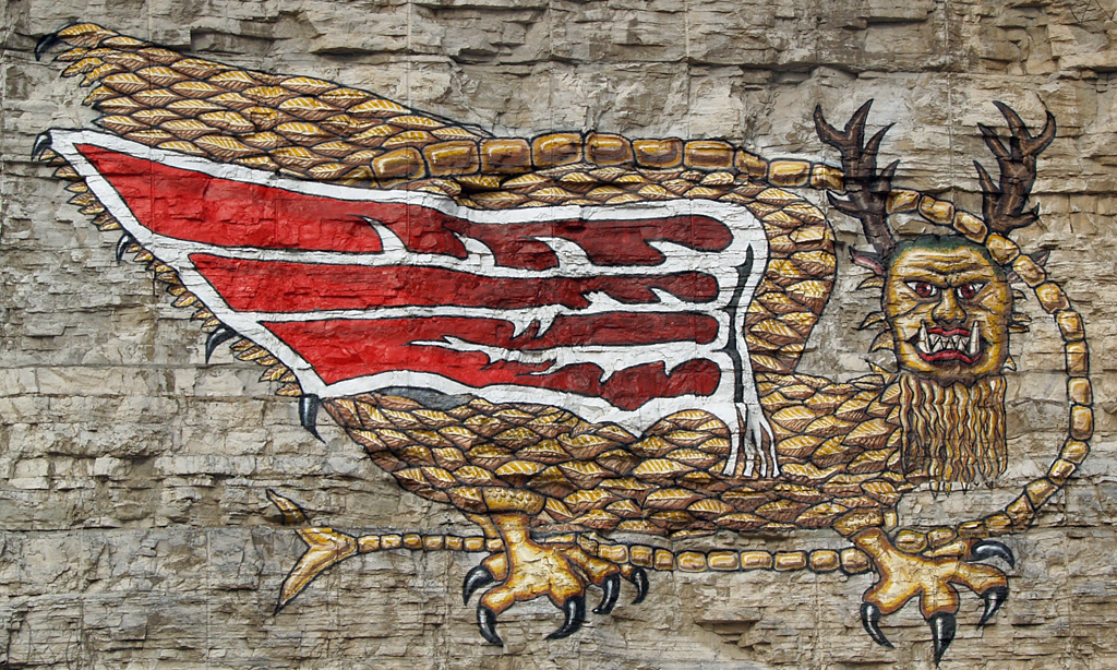 Piasa Bird